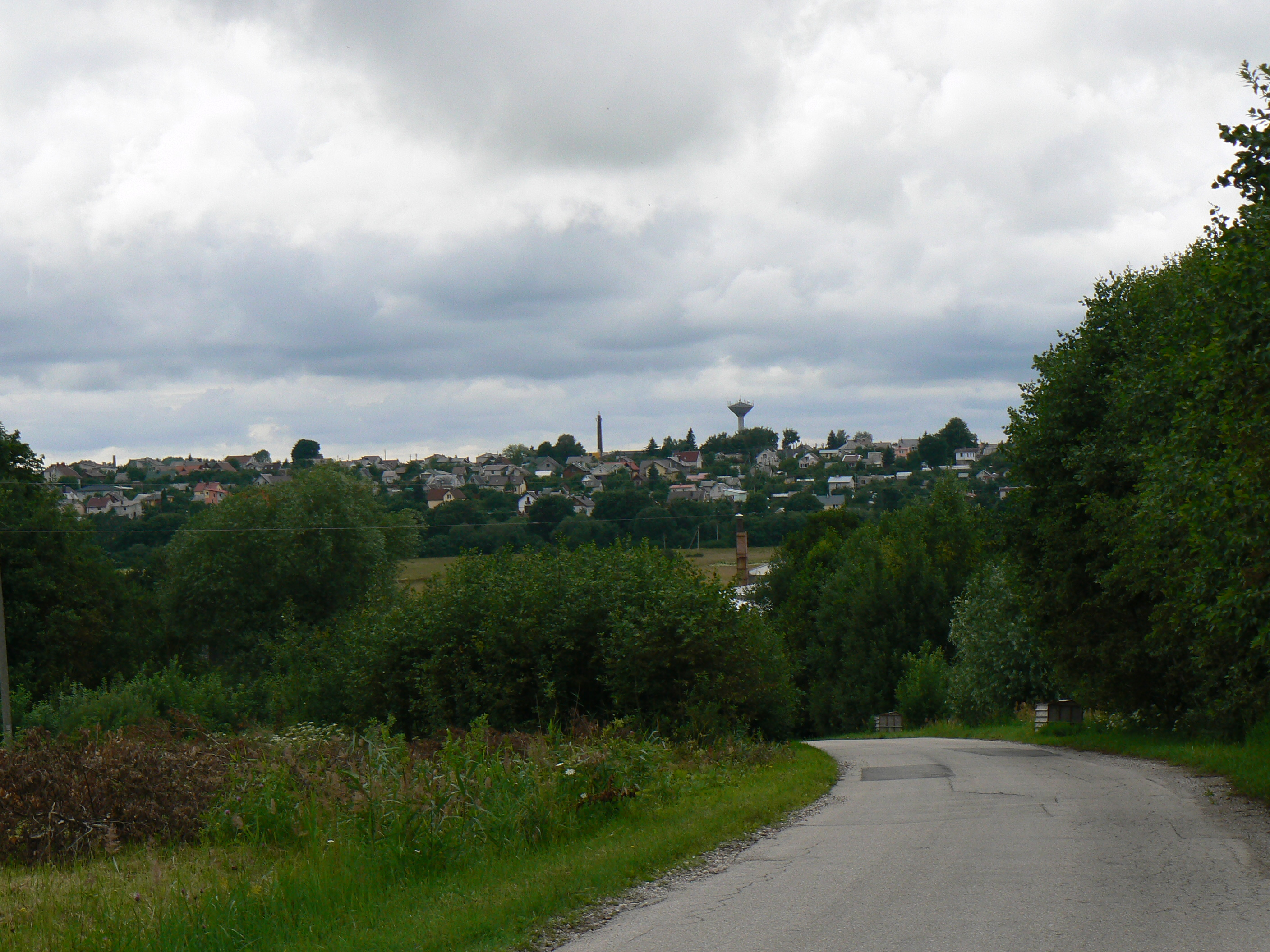 Pohled na okresní město Gargždai od vsi Maciuičiai přes údolí řeky Minija. Pohled od východu.